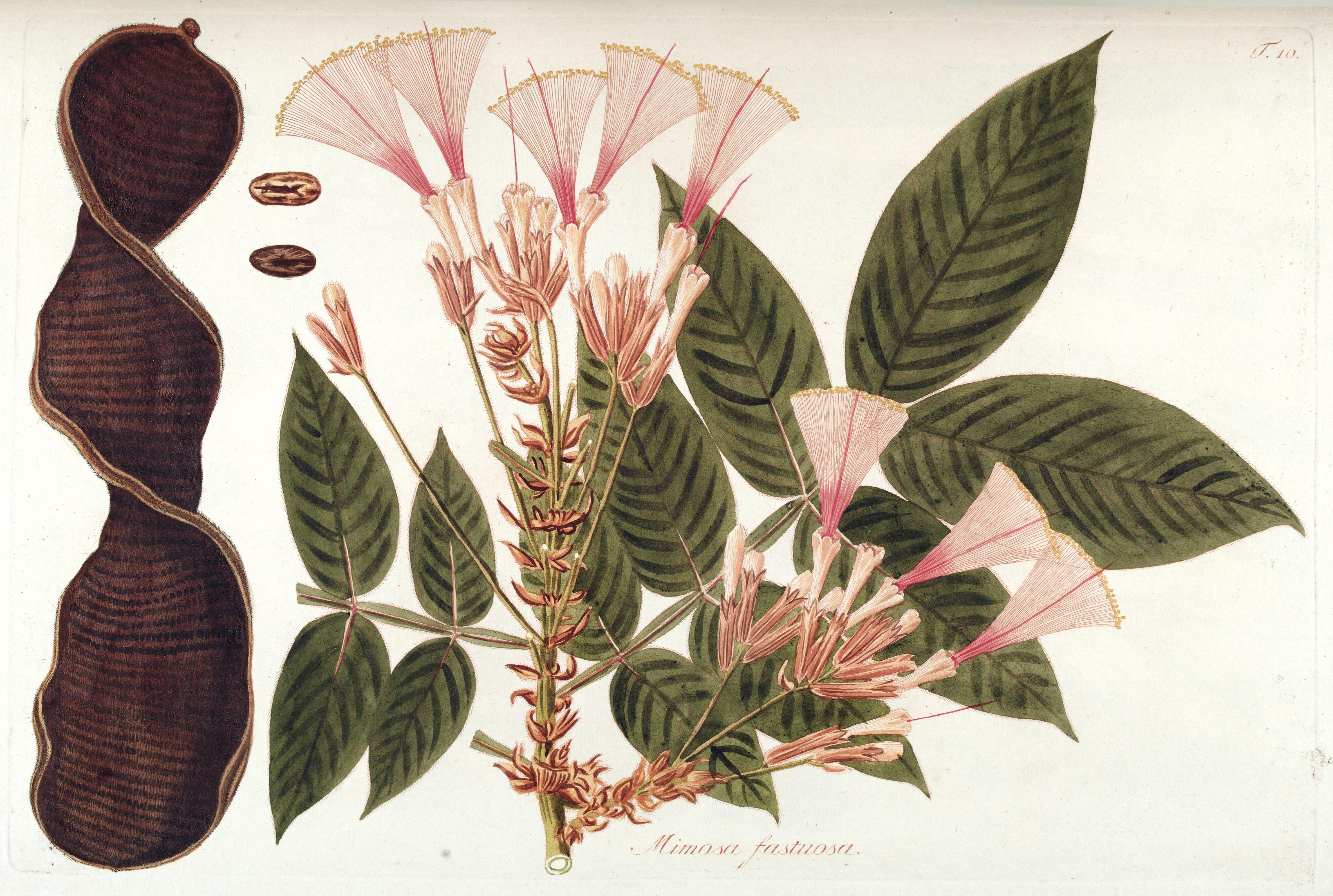 Fragmenta botanica, figuris coloratis illustrata :ab anno 1800 ad annum 1809 per sex fasciculos edita /opera et sumptibus Nicolai Josephi Jacquin.